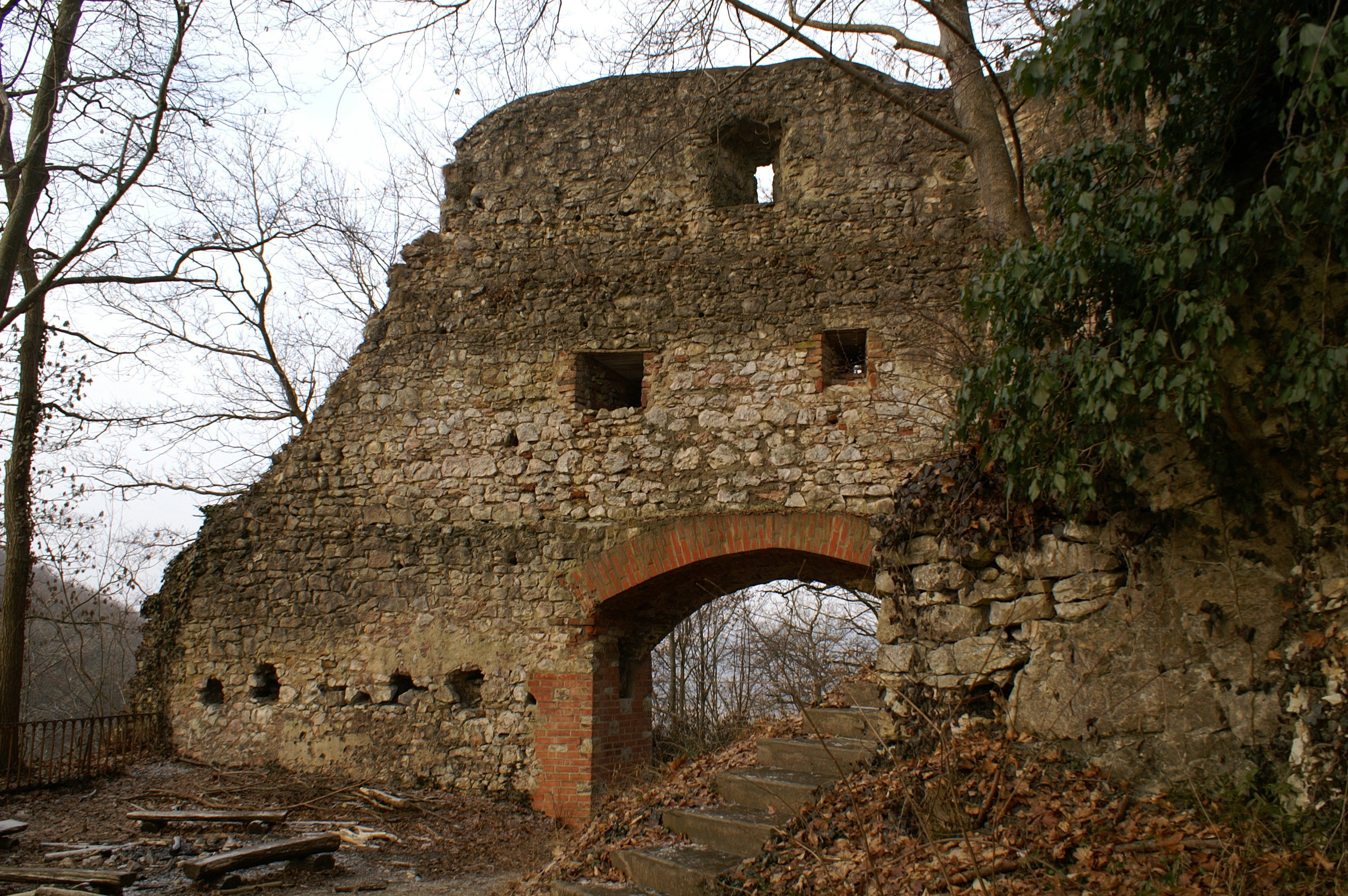 Mauerrest vom Torhaus der Mittelburg von Burg Klingenstein